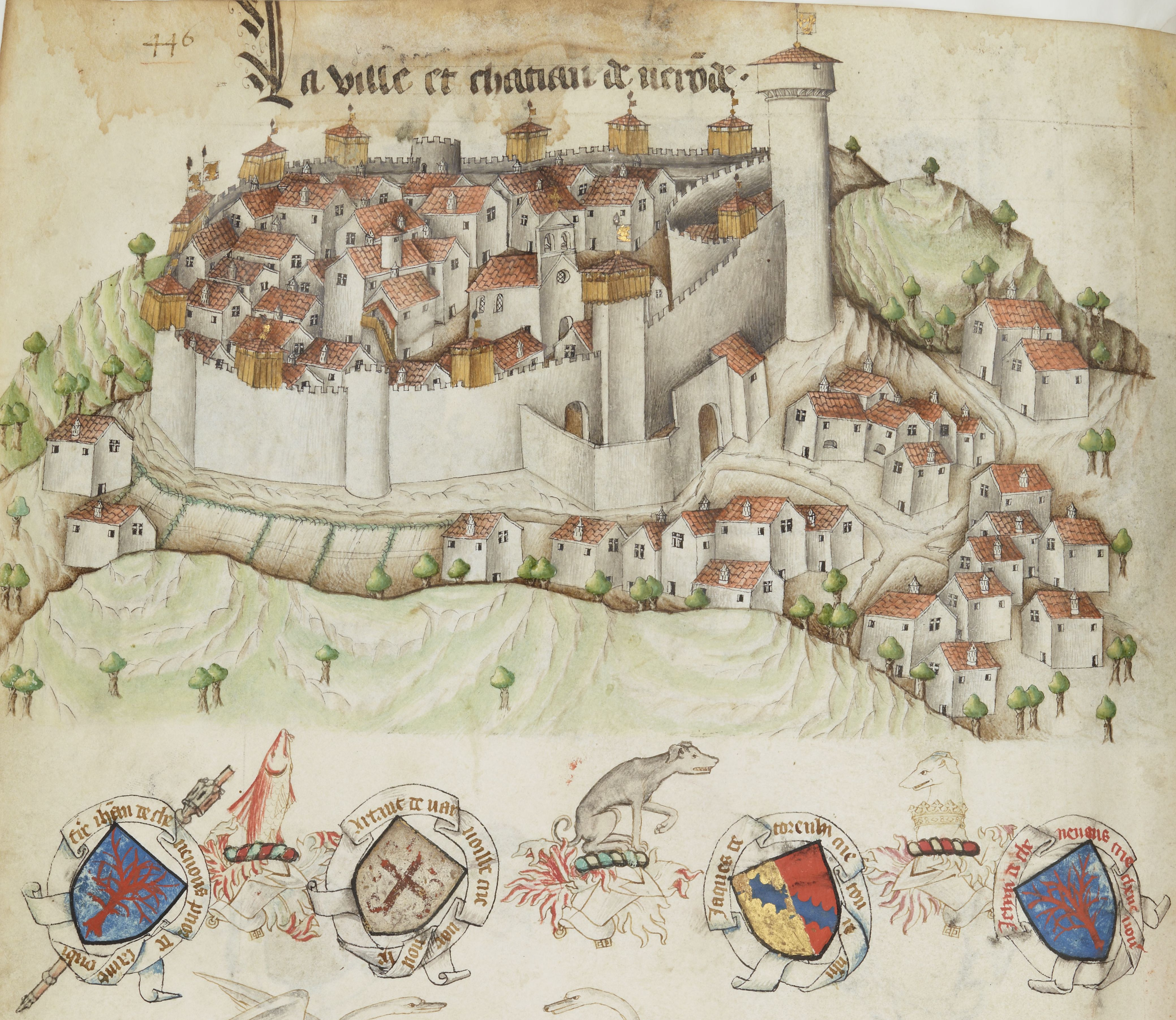 Néronde in armorial d'Auvergne description de villes chateaux et blasons.